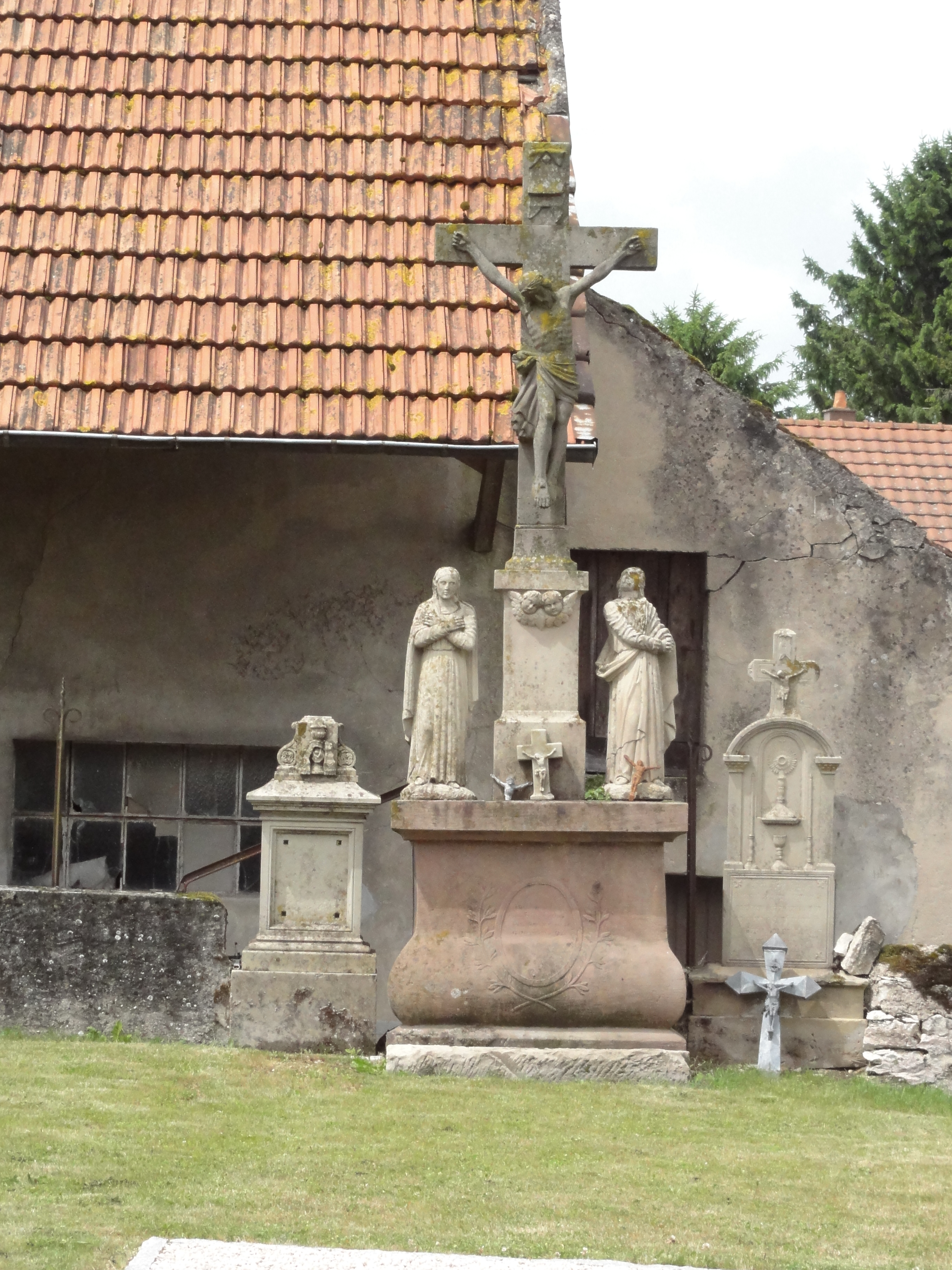 Fleisheim (Moselle) calvaire